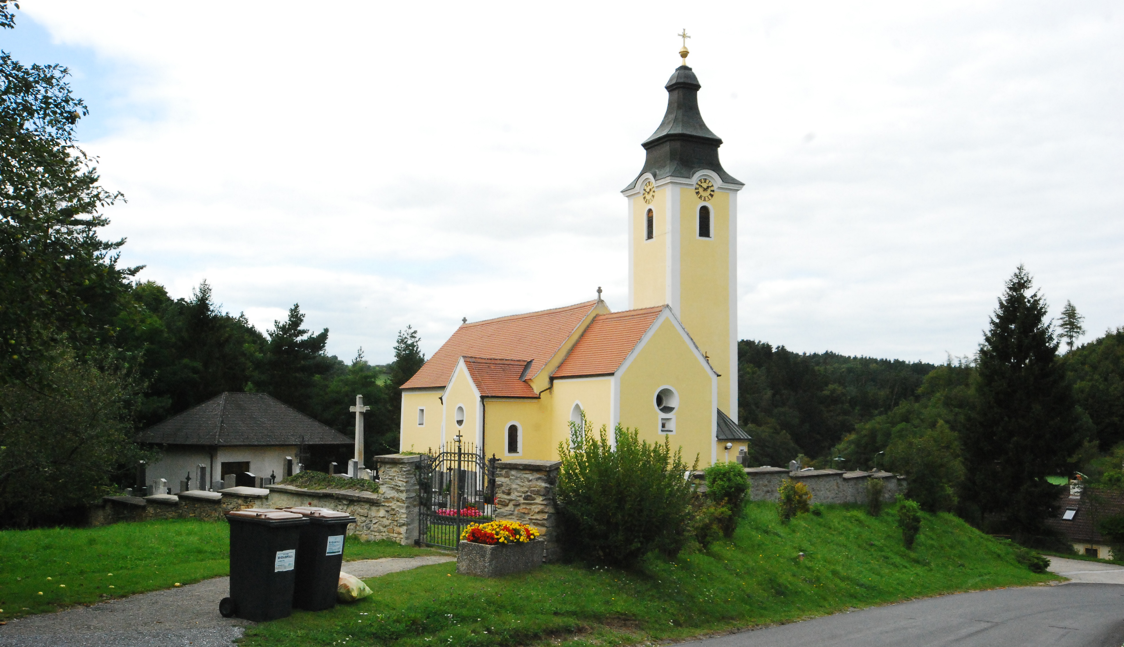 Kath. Pfarrkirche hl. Jakobus der Ältere